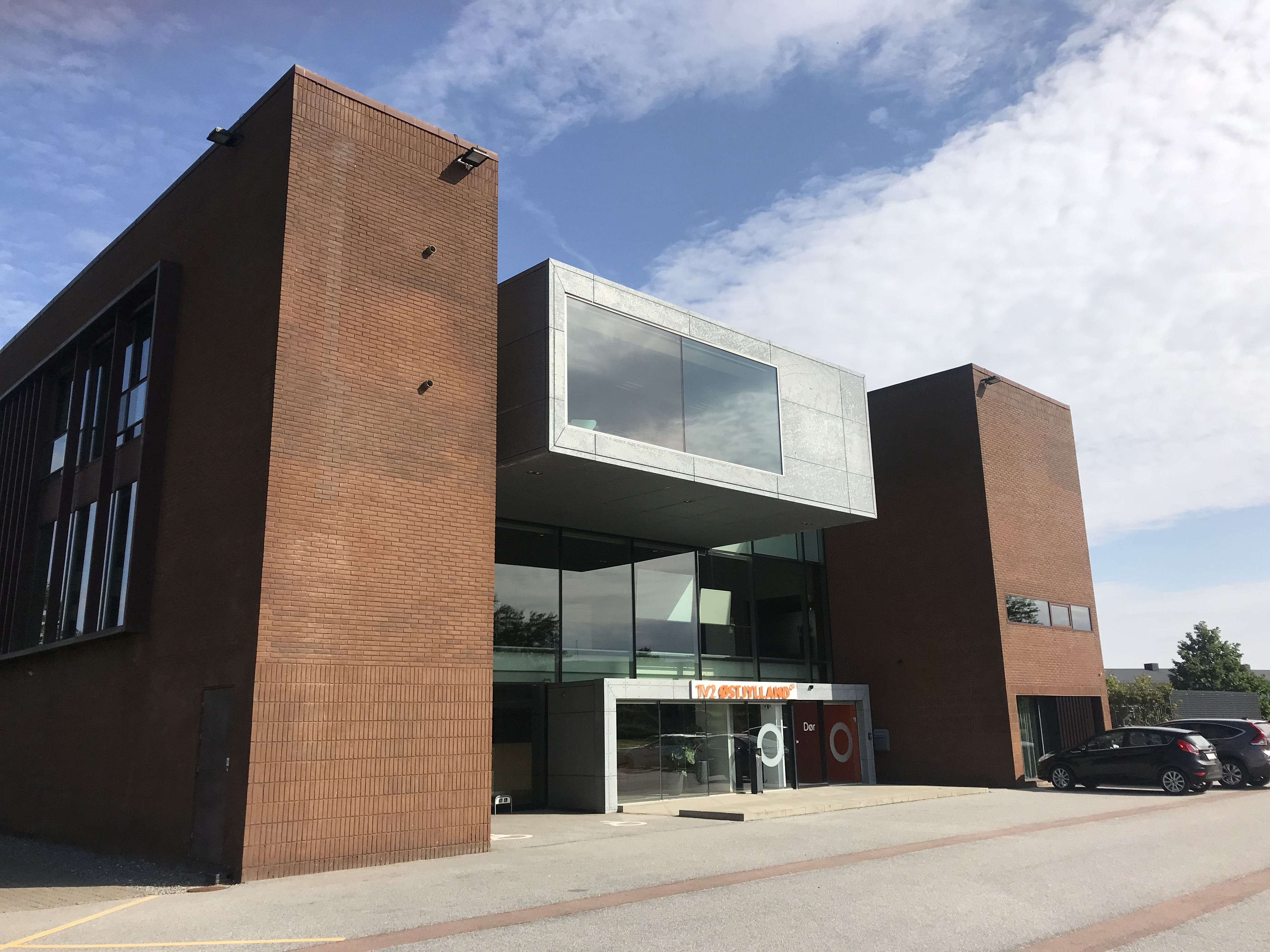 TV2 ØSTJYLLAND i Skejbyparken.